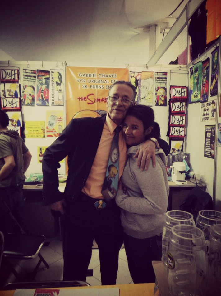 Gabriel Chavez.